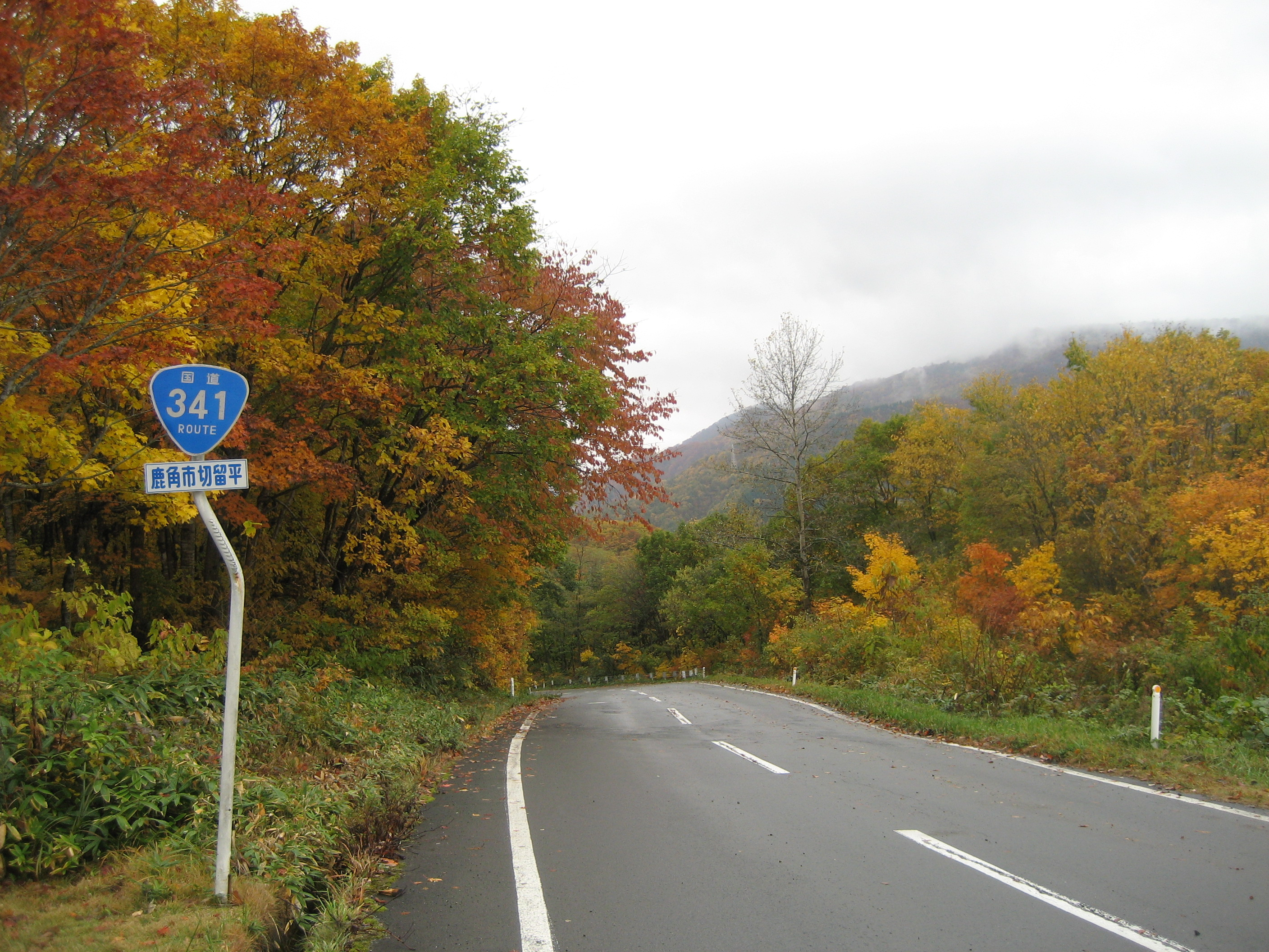 国道282号線秋田県鹿角市切留平付近